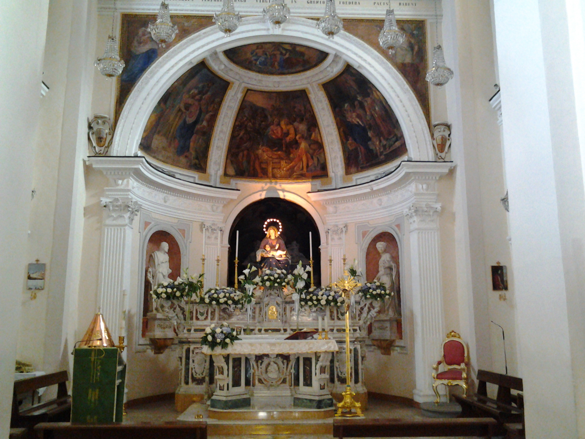 Altare della Chiesa di Santa Maria del Parto (Napoli)